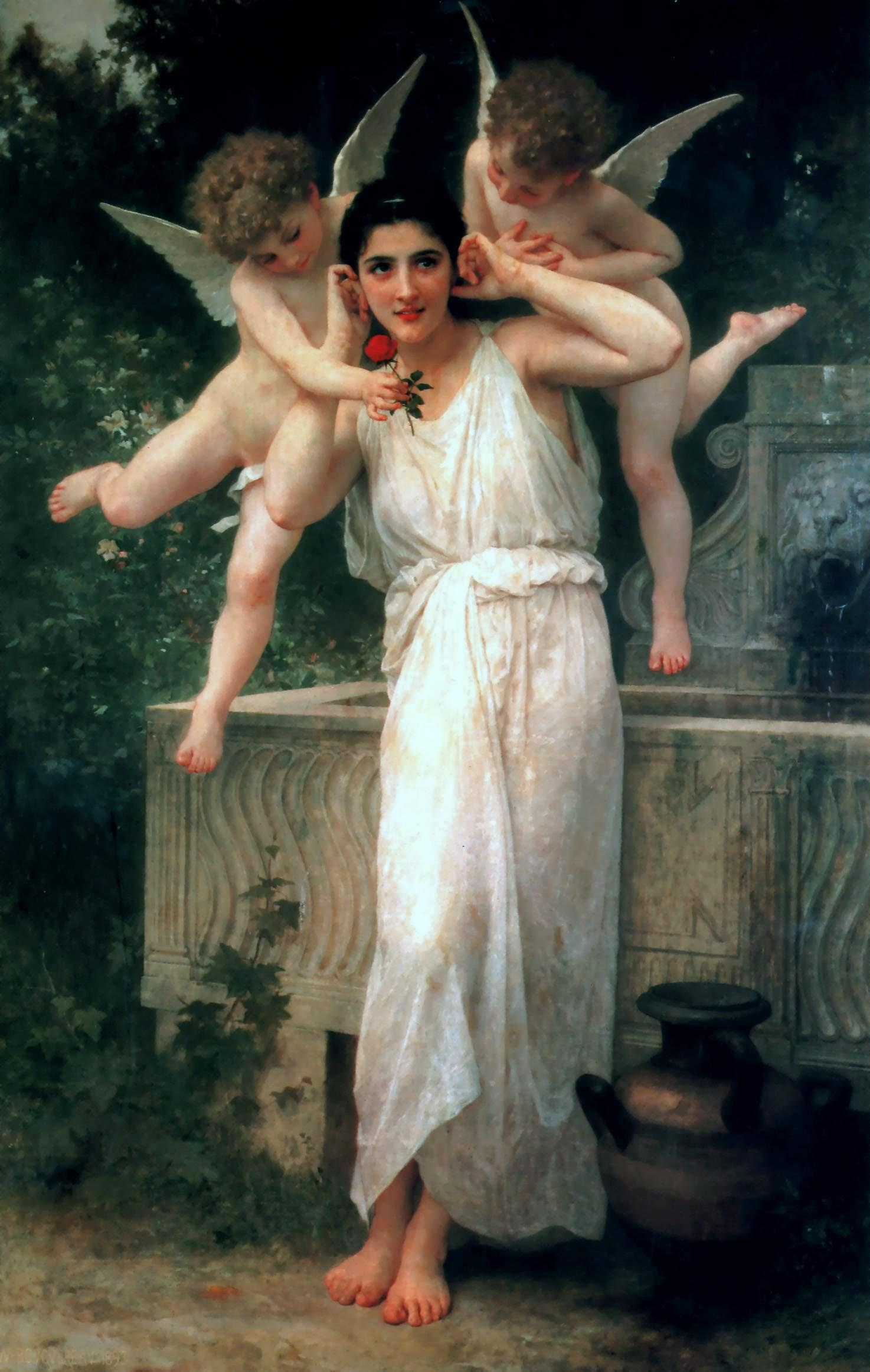 Французский неоклассической живописи с 1893